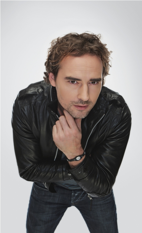 Jeroen Nieuwenhuize (Hoogerheide, 3 juli 1972[1]) is een Nederlandse diskjockey.